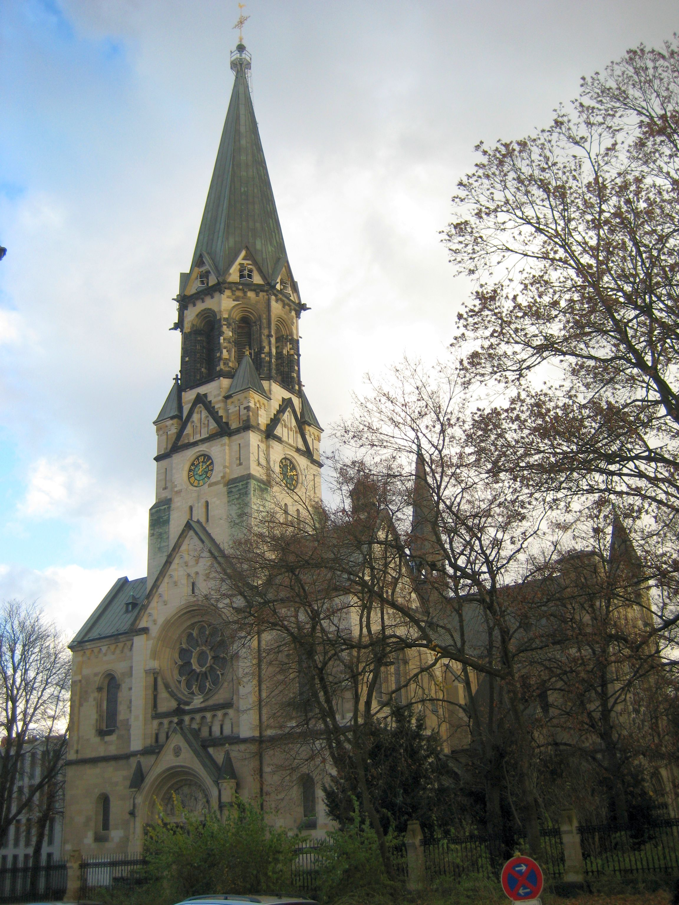 Johannes-Basilika in Lilienthalstraße in Berlin-Neukölln; built 1895-1897, plans by August Menken